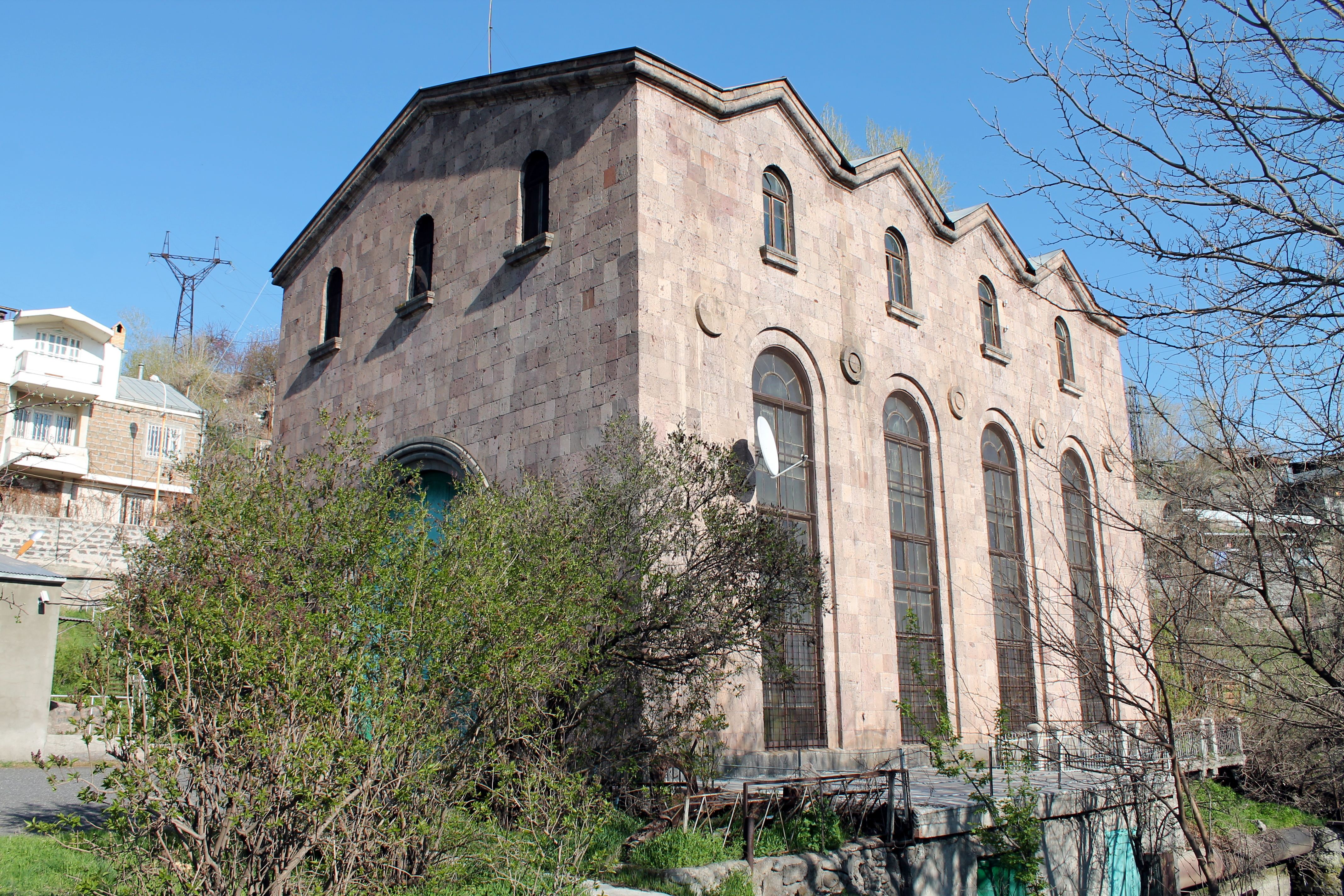 Здание Ереванской ГЭС-3